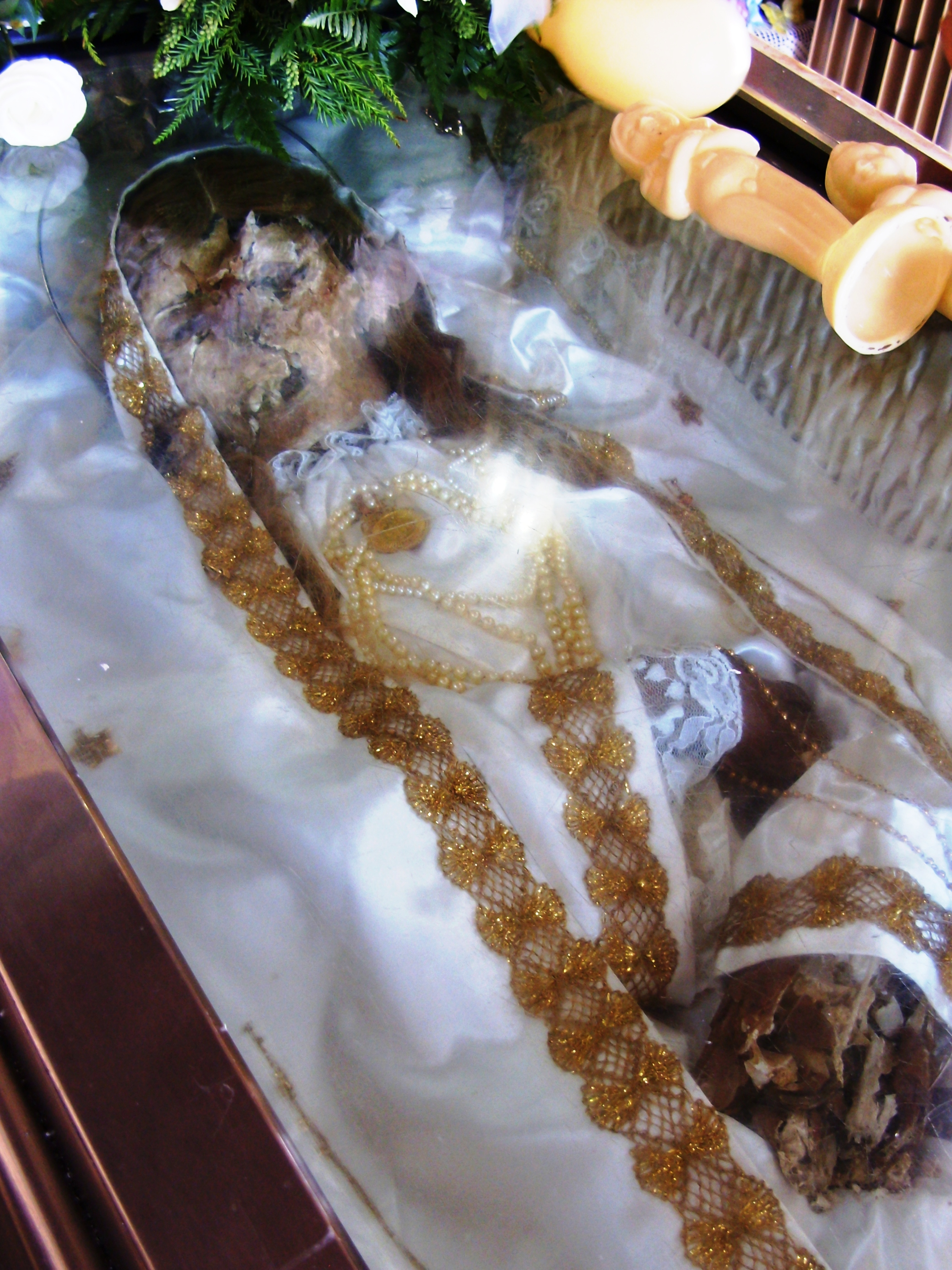 Santo em carne de D. Maria Adelaide de Sam José e Sousa, também referida como Santa Maria Adelaide e Santinha de Arcozelo, Arcozelo, Vila Nova de Gaia, distrito do Porto, Portugal.